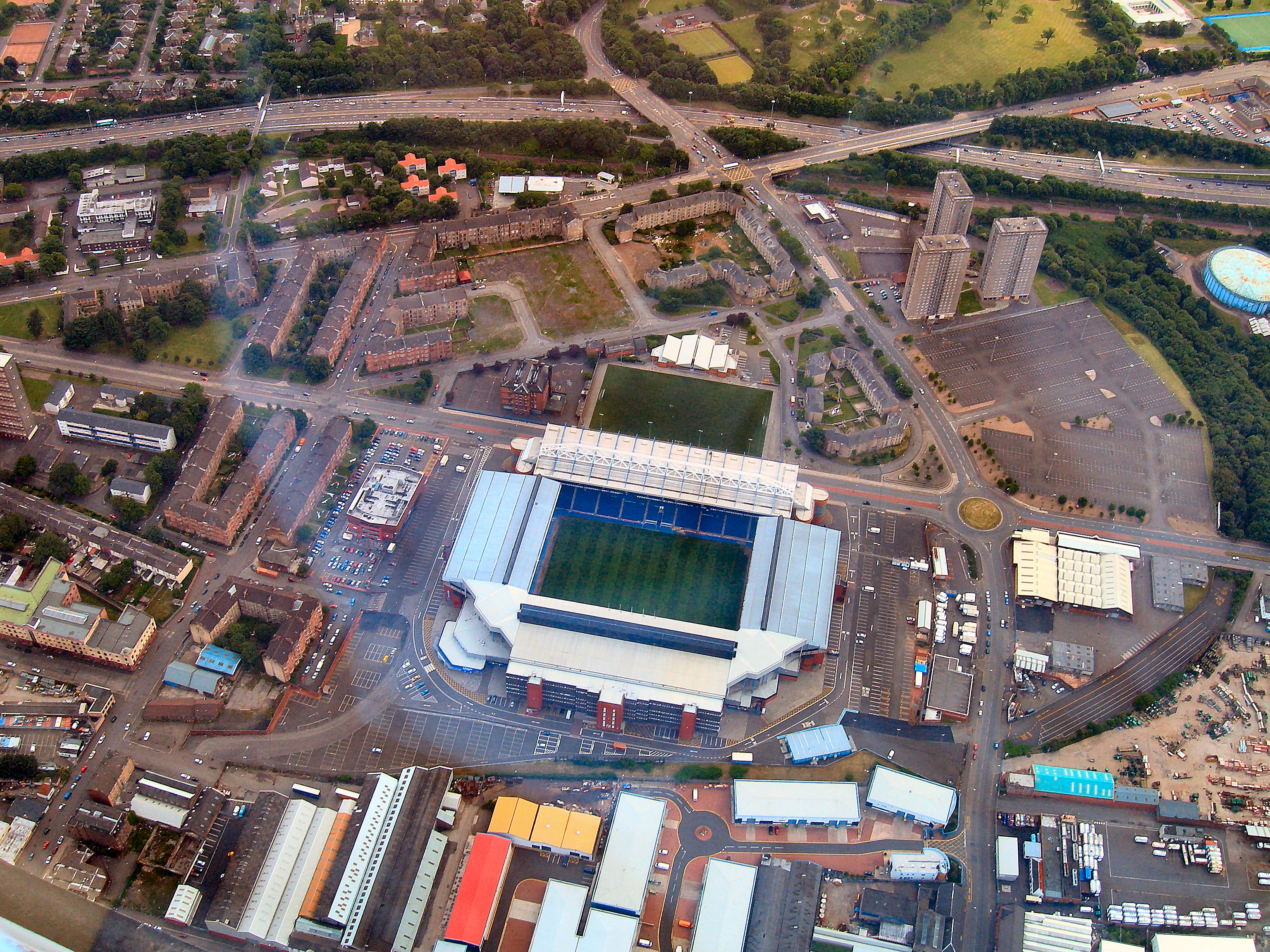 Ibrox Stadium Glasgow. Home Of Rangers FC